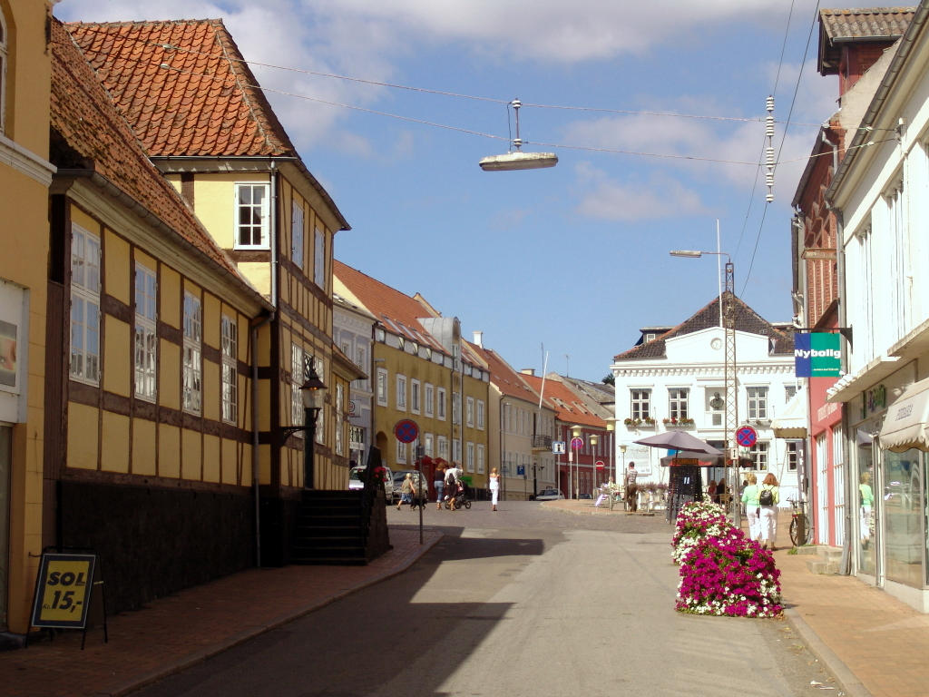 Rudkøbing auf Langeland (Dänemark)